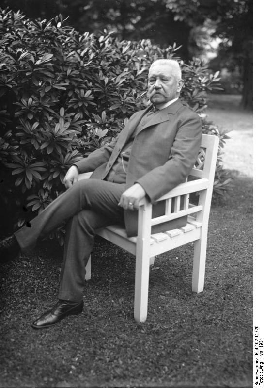 Wo lebt und schafft der deutsche Reichspräsident! Reichspräsident von Hindenburg bei einer Erholungspause im Garten des Palais in der Wilhelmstrasse.